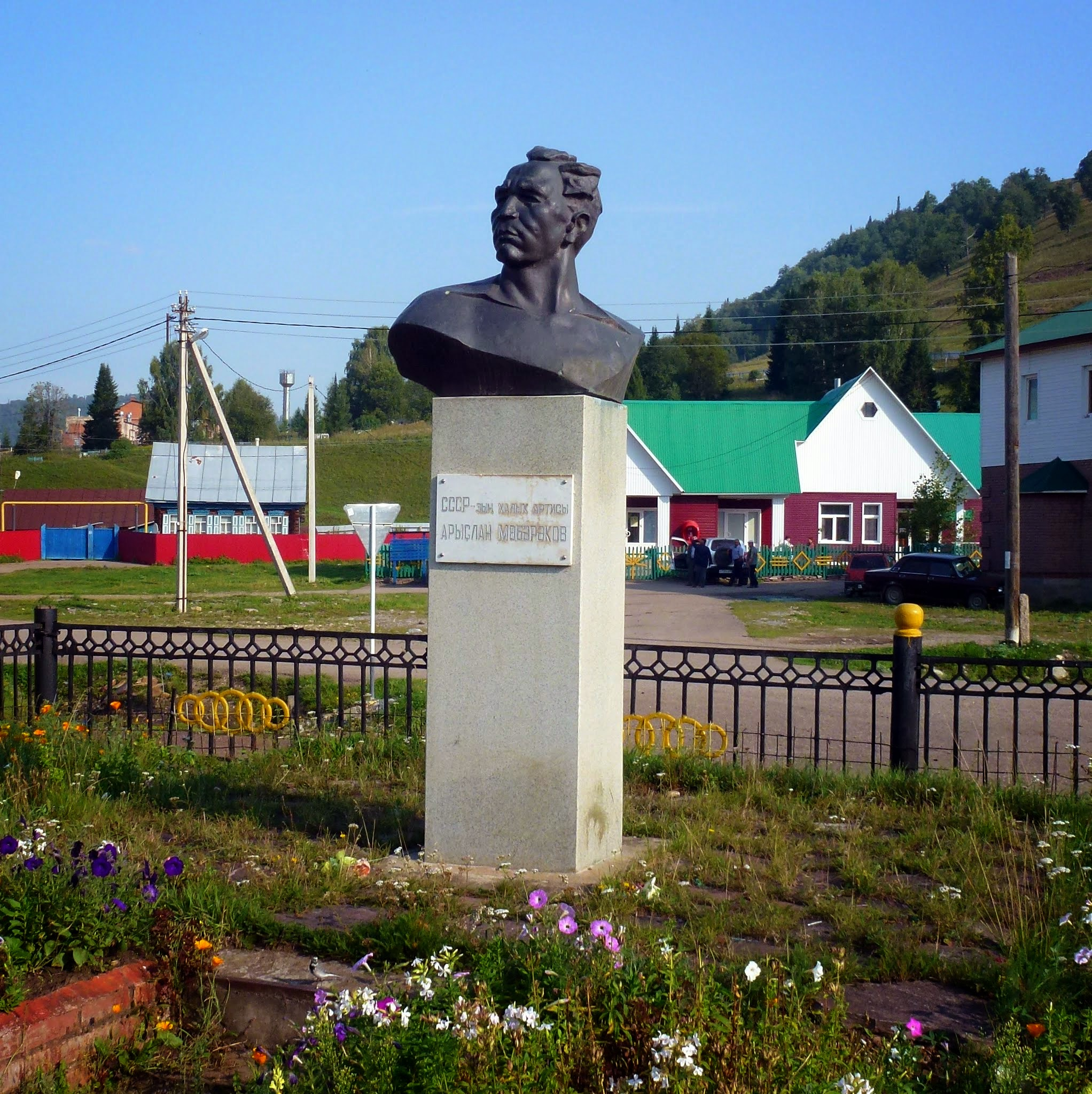 Мубаряков, Арслан Котлыахметович (1908—1977), башкирский советский актёр, театральный режиссёр, драматург. Ассы, Башкортостан